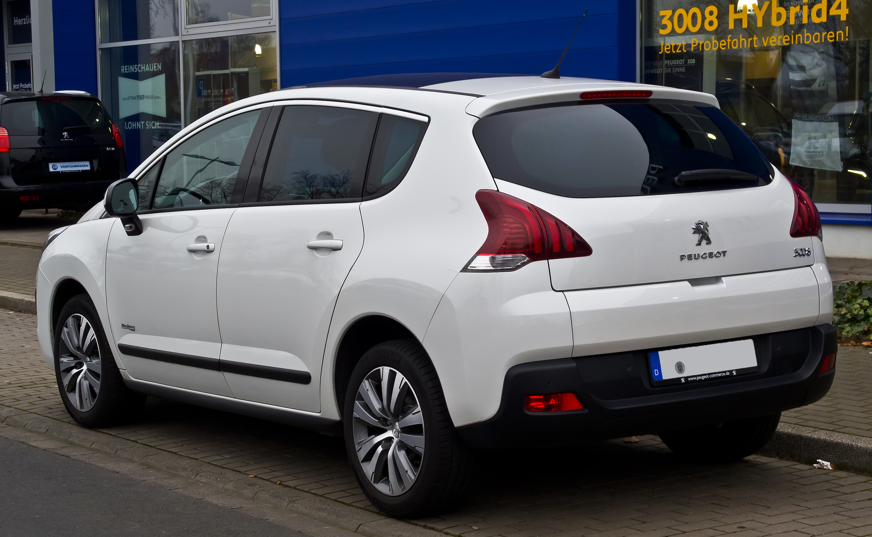 Peugeot 3008 Business-Line (Facelift)